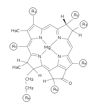 структура общего ядра всех хлорофиллов